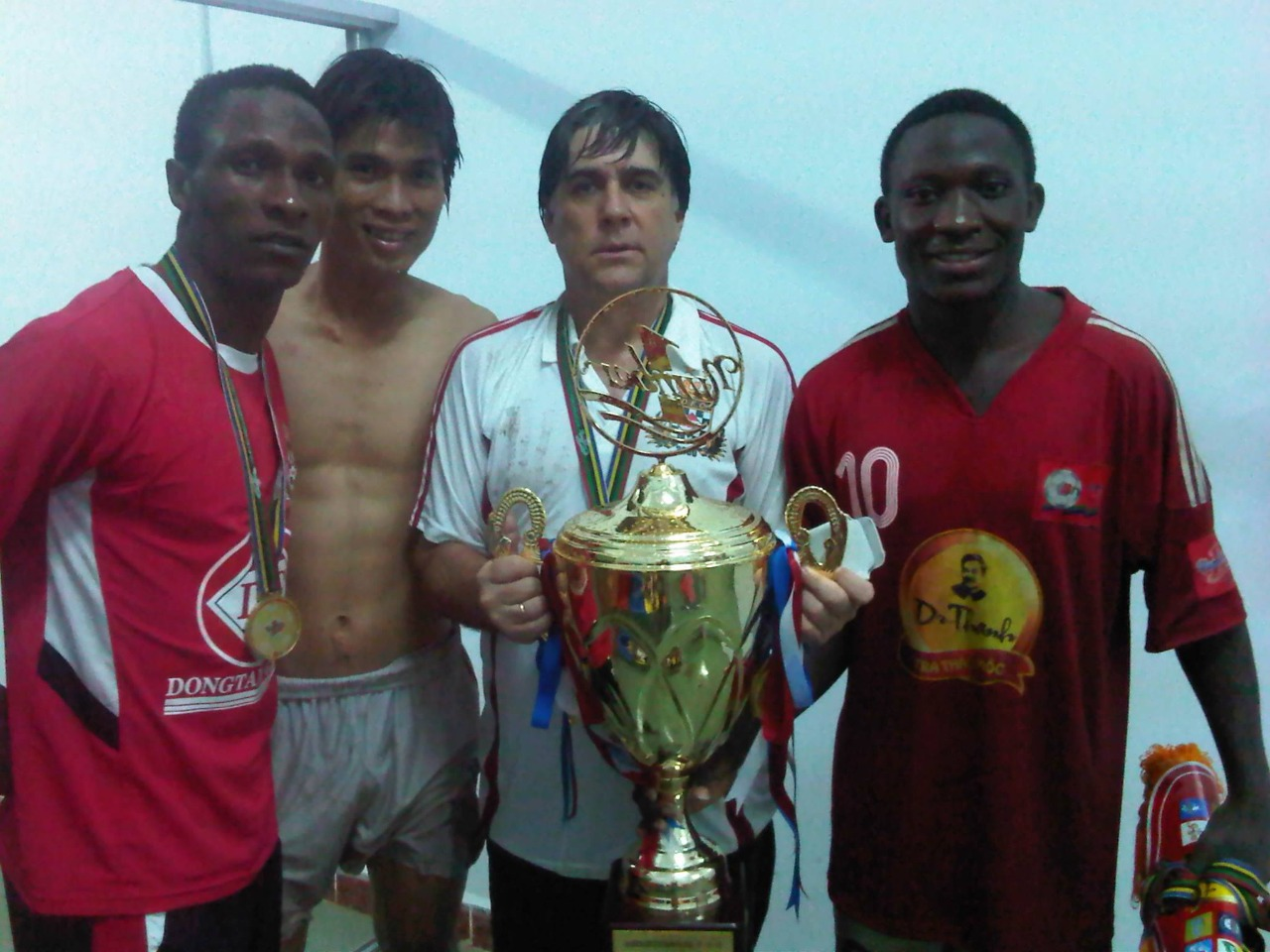 ZULETA CON TROFEO